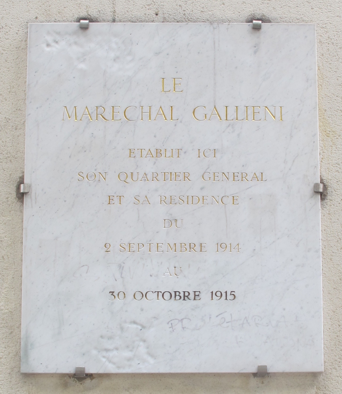 Plaque sur la façade du lycée Victor-Duruy (Paris, 7e), indiquant que le maréchal Gallieni en fit son quartier général et sa résidence en 1914-1915.